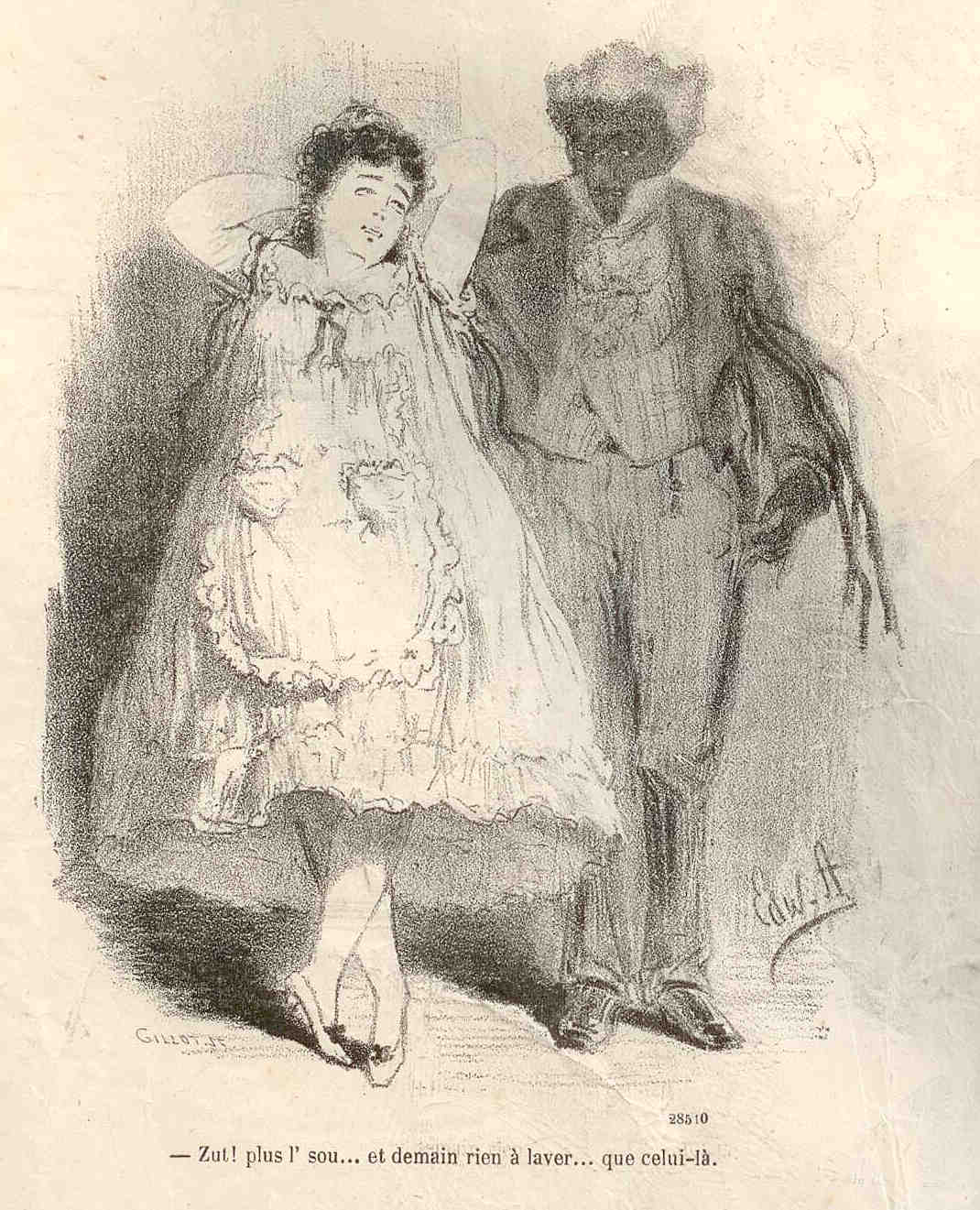 Dessin d'Edward Ancourt illustrant les bals masqués du Carnaval de Paris, extrait du Journal Amusant, numéro 737, 12 février 1870.